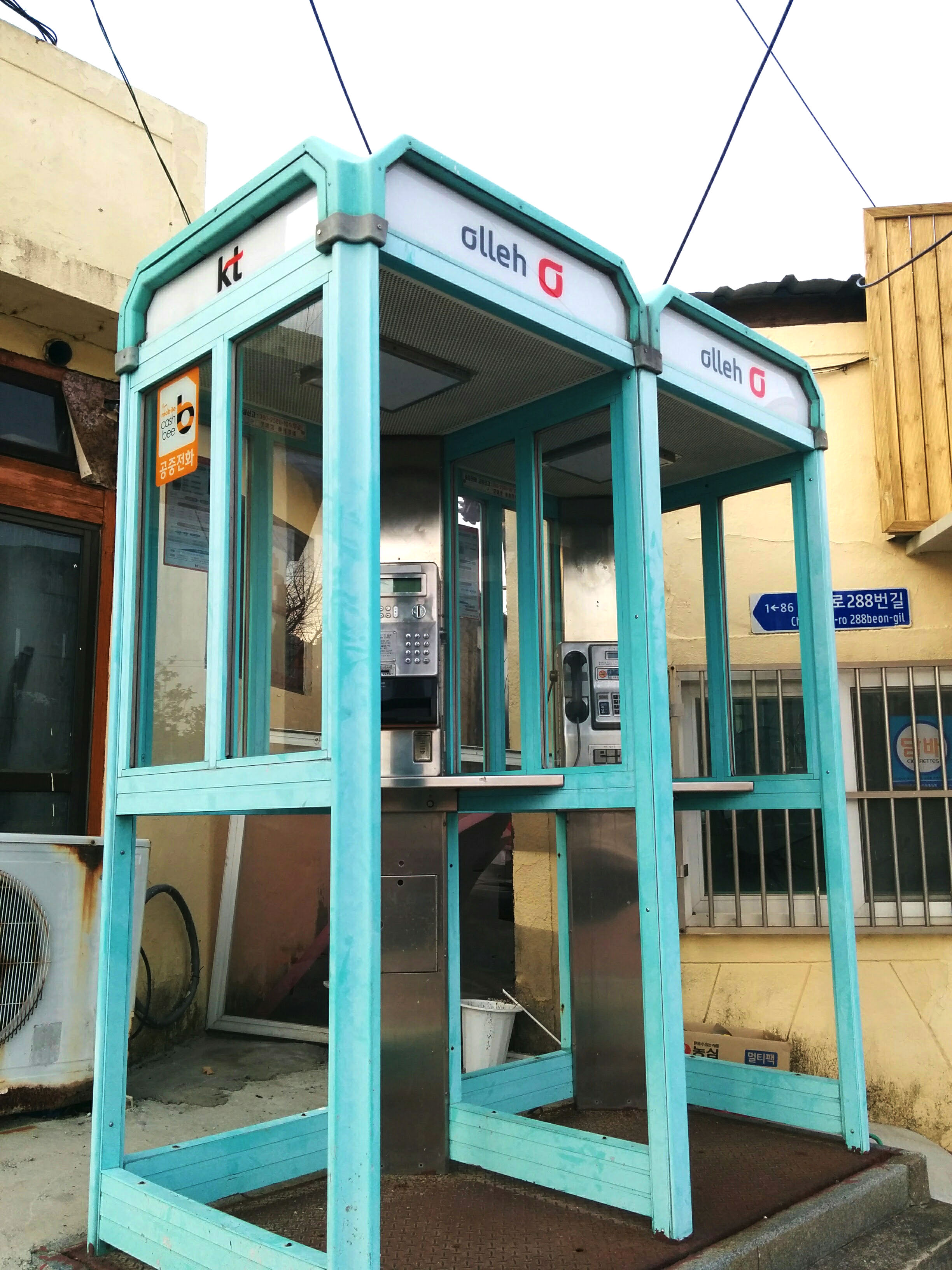 大韓民国でよく見かけるKTの公衆電話。機張郡付近で撮影。